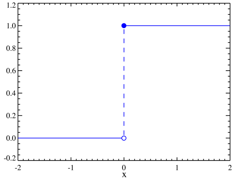 heaviside functie wiki en; GNU FDl MO: definitie x(0) aangepast